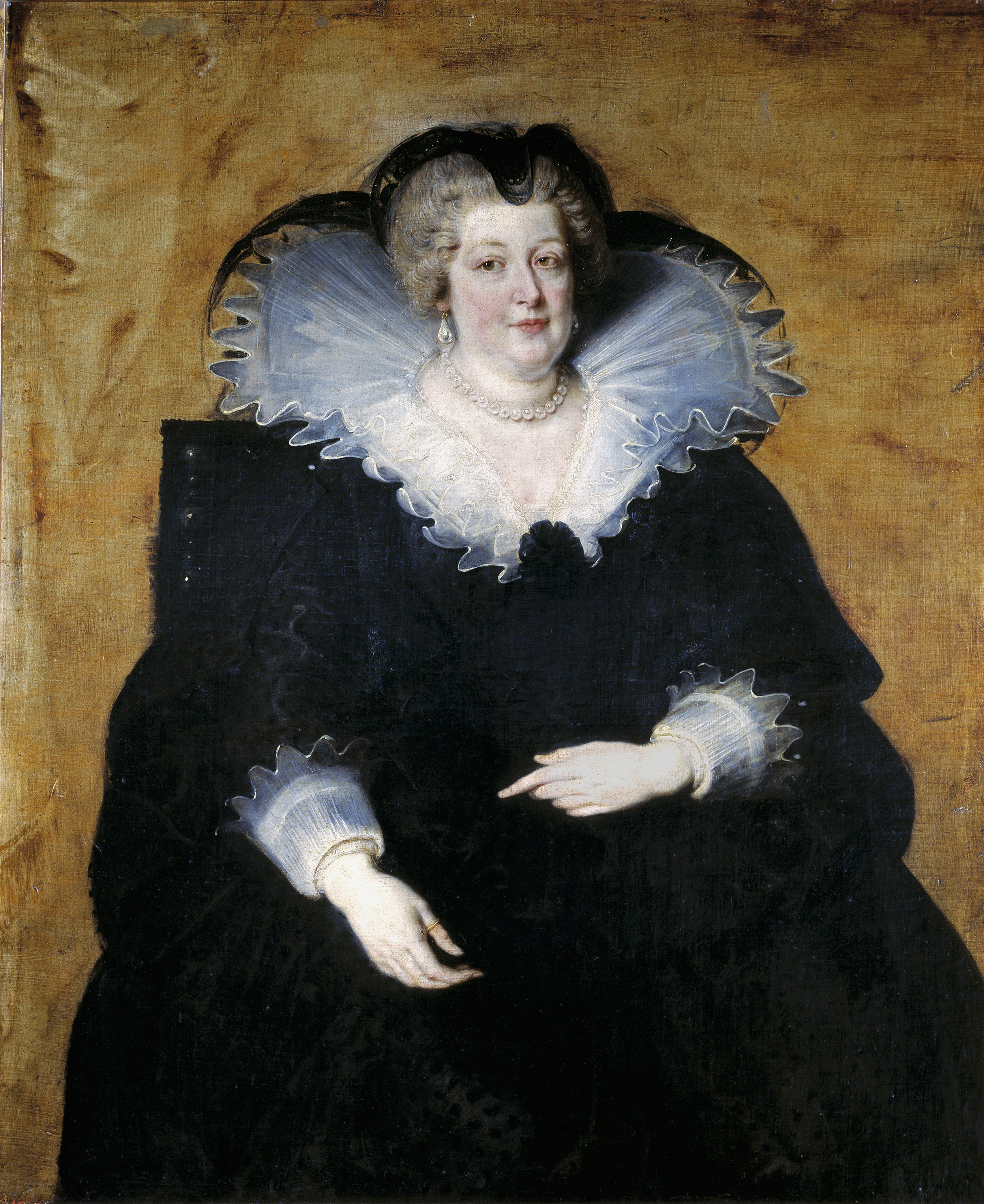 Retrato de la reina María de Médici (1575-1642), que fue reina consorte de Francia por su matrimonio con el rey Enrique IV de Francia y era hija de Francisco I de Médici, gran duque de Toscana, y de Juana de Habsburgo-Jagellón.